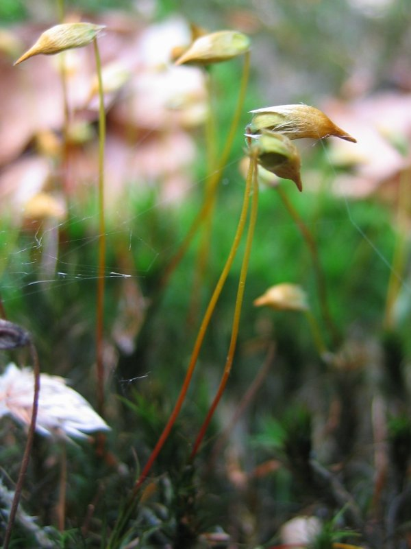 Schönes Frauenhaarmoos Polytrichum formosum, Sporophyt, Müritz-Gebiet